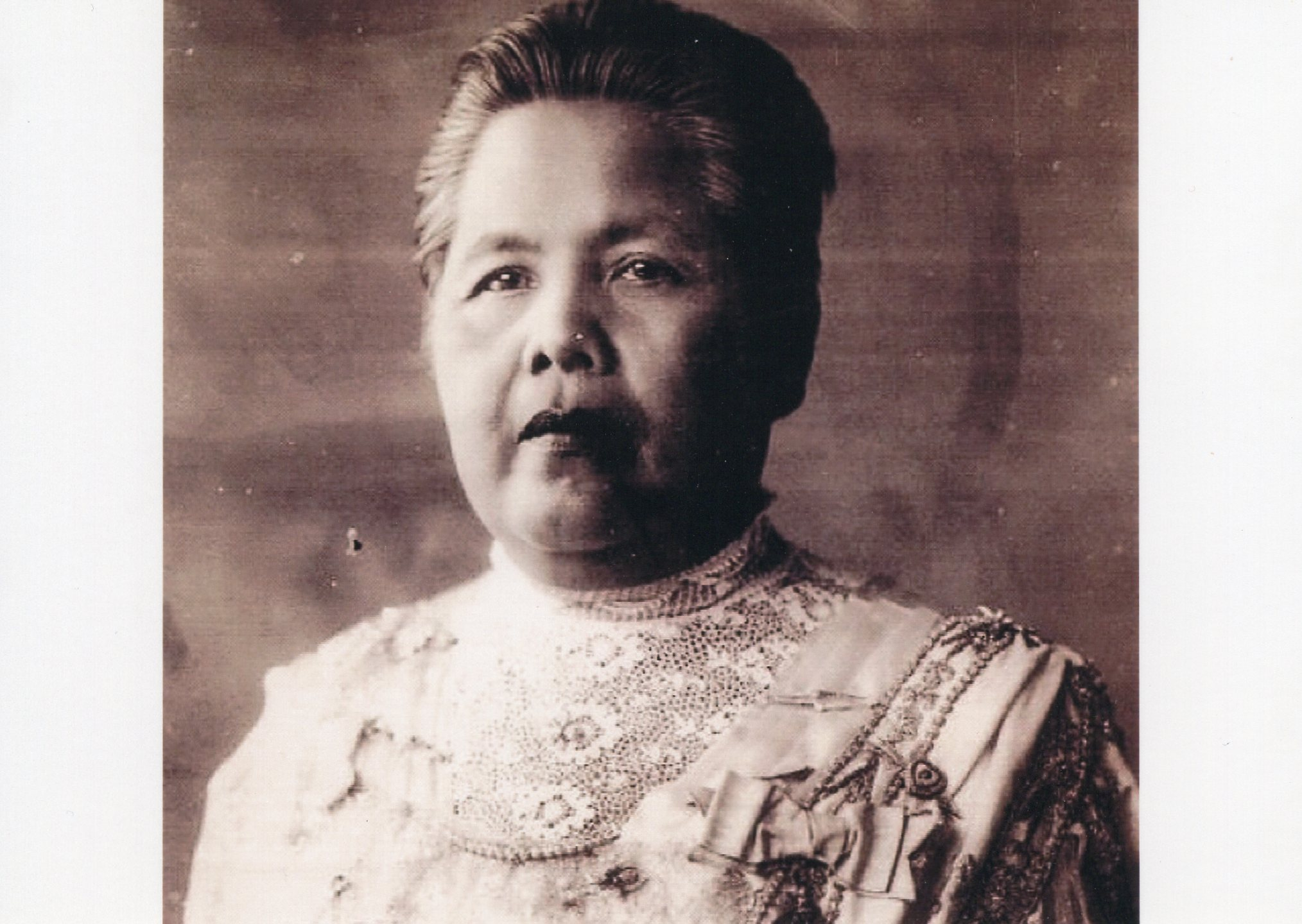 เจ้าจอมมารดาเหม